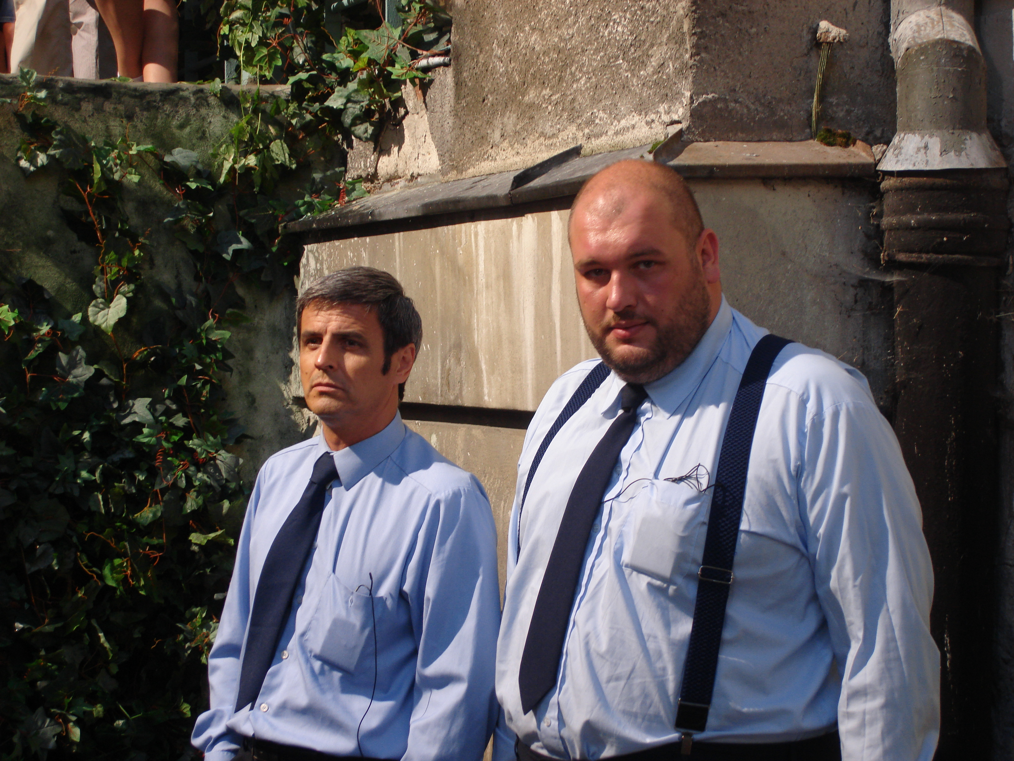 Komisarz Możejko (Piotr Polk) i aspirant Nocul (Michał Piela)